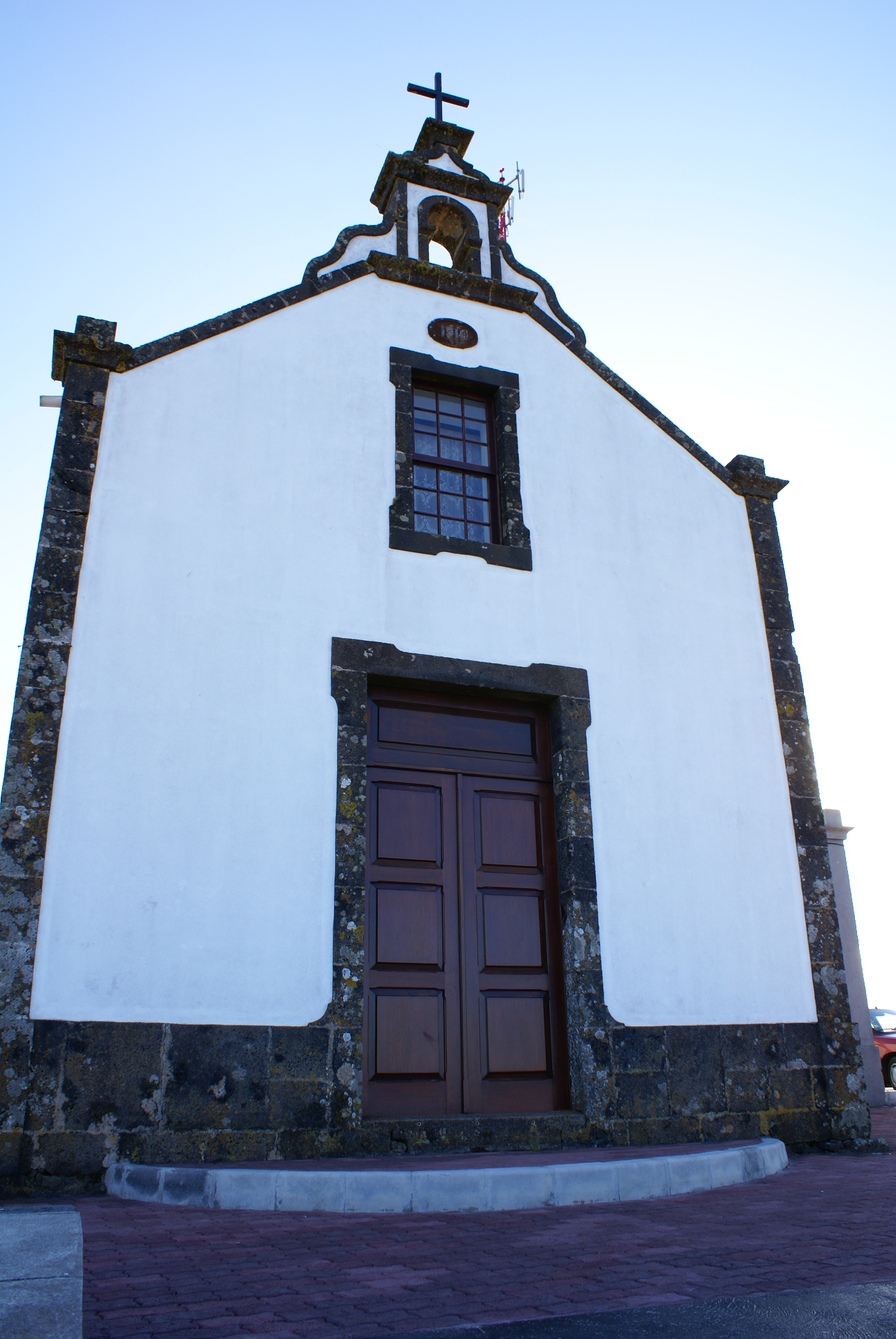 Ermida de Nossa Senhora da Saúde, vila da Praia, ilha Graciosa, Açores, Portugal